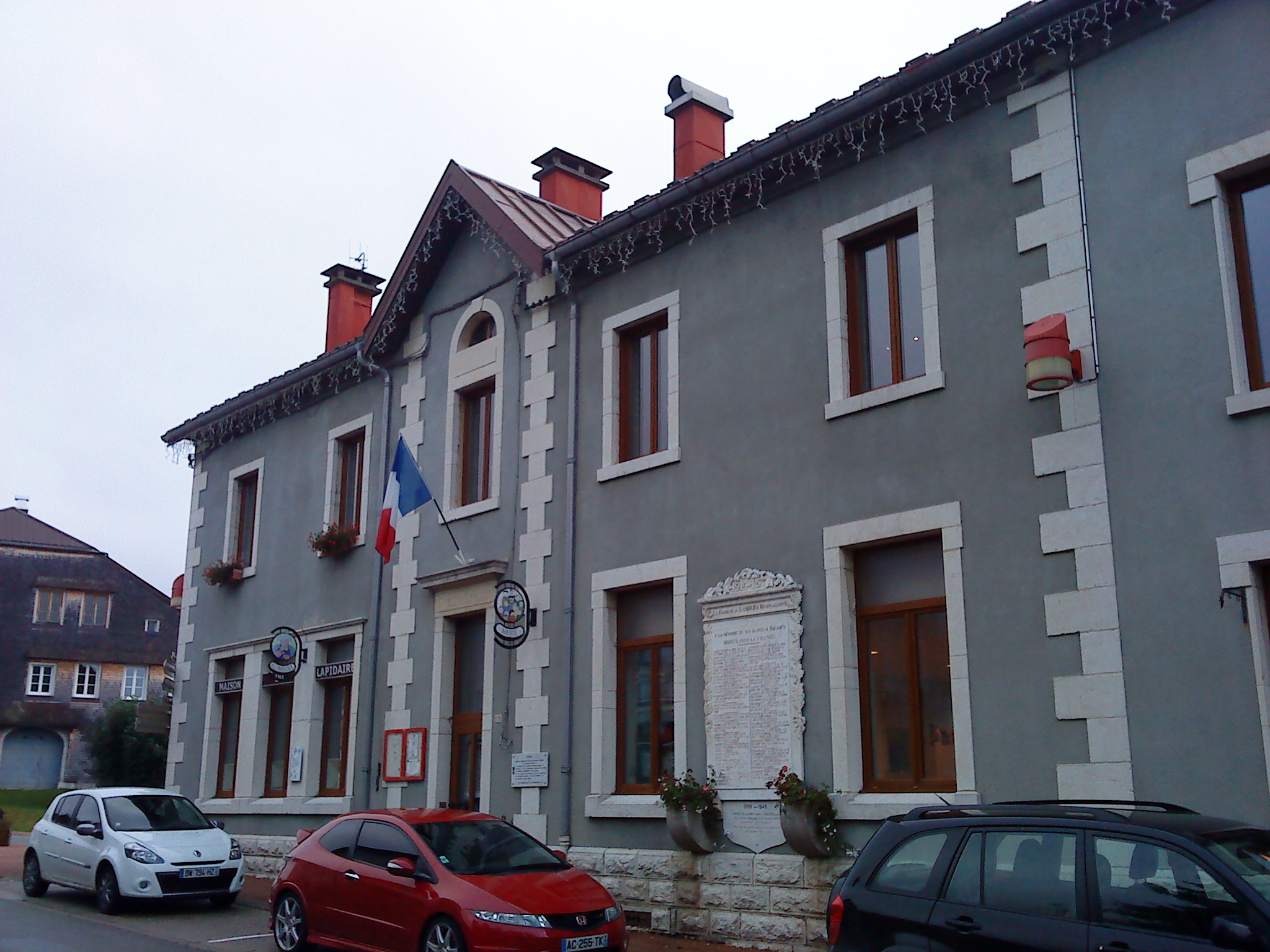 Mairie de Lamoura, Jura, France